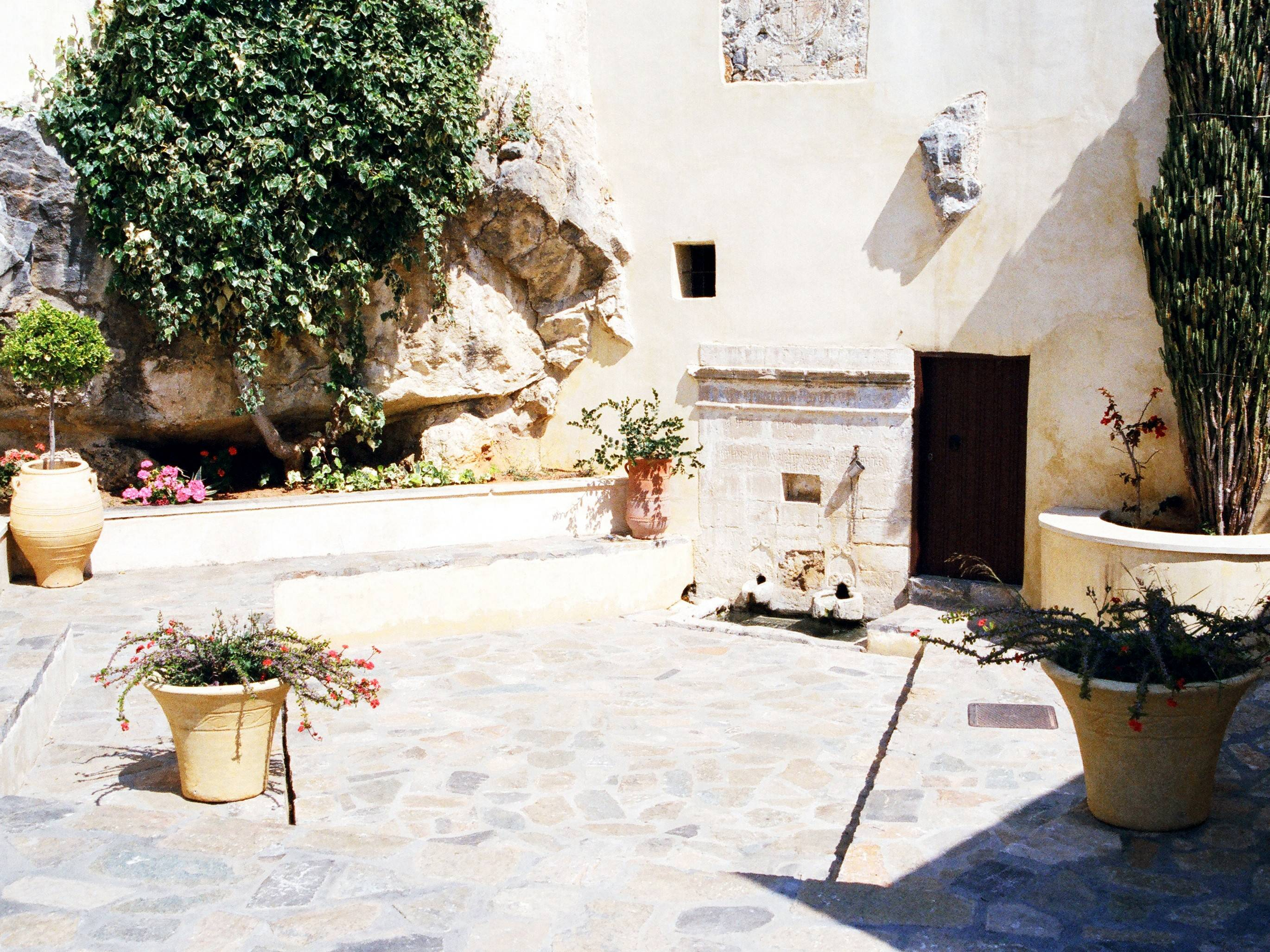 Mönchskloster Moni Preveli, Kreta (Griechenland)